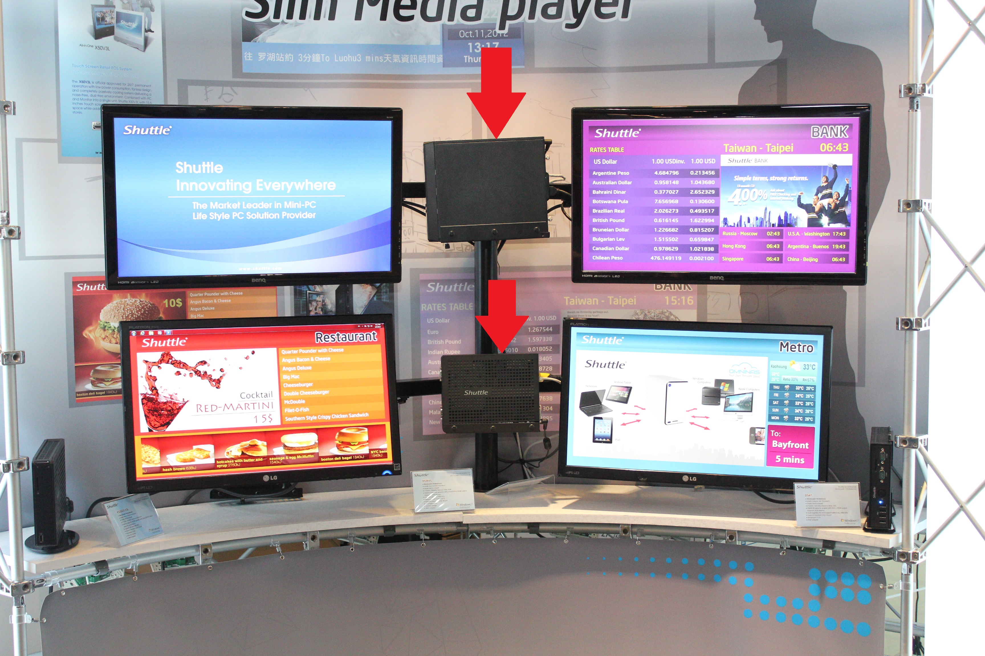 Плеер Shuttle в Digital Signage